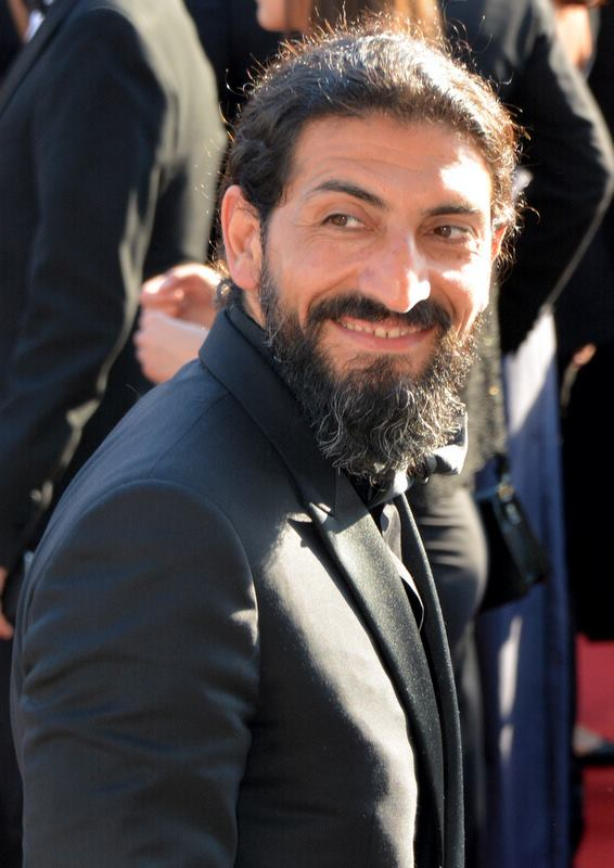 Numan Acar au festival de Cannes